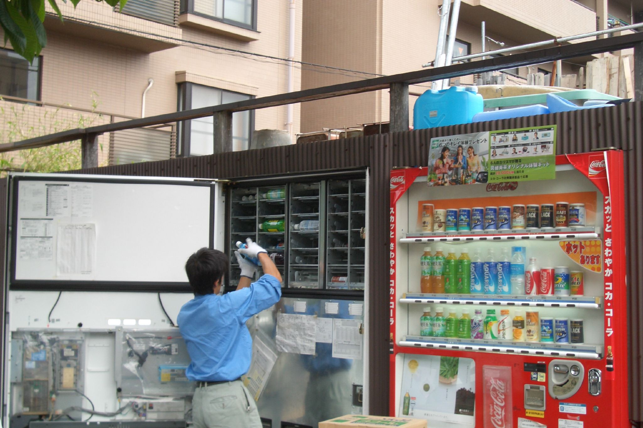 スカッと さわやか コカ・コーラ